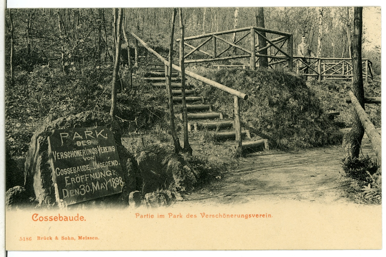 Cossebaude; Im Park des Verschönerungsvereins This postcard is from publisher Brück & Sohn in Meißen ( postcard has a unique number 05186 and is available in a higher resolution at the publisher. This images was uploaded in a cooperation project between Wikipedians and the publisher.